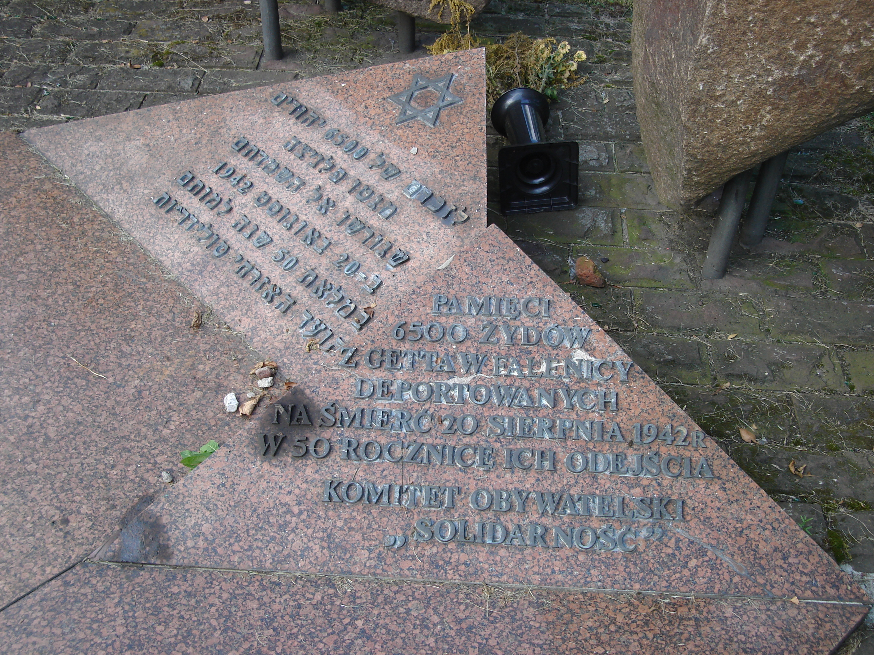 Pomnik poświęcony zamordowanym przez Niemców Żydom z falenickiego getta